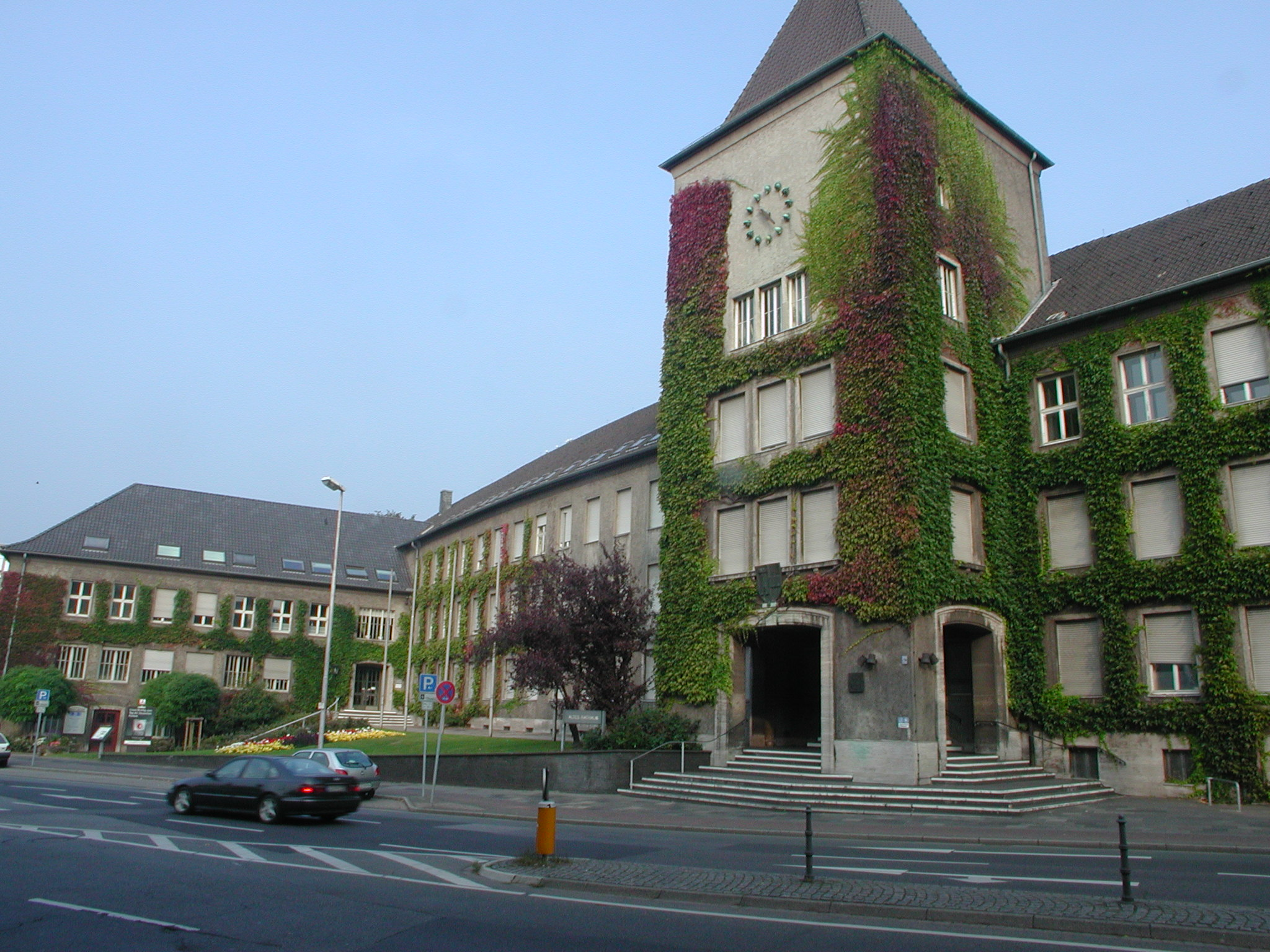 Das sog. alte Rathaus in Moers stammt aus den 1950er Jahren